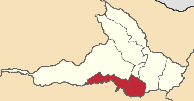 Mapa localizacor del cantón Otavalo, Imbabura, Ecuador